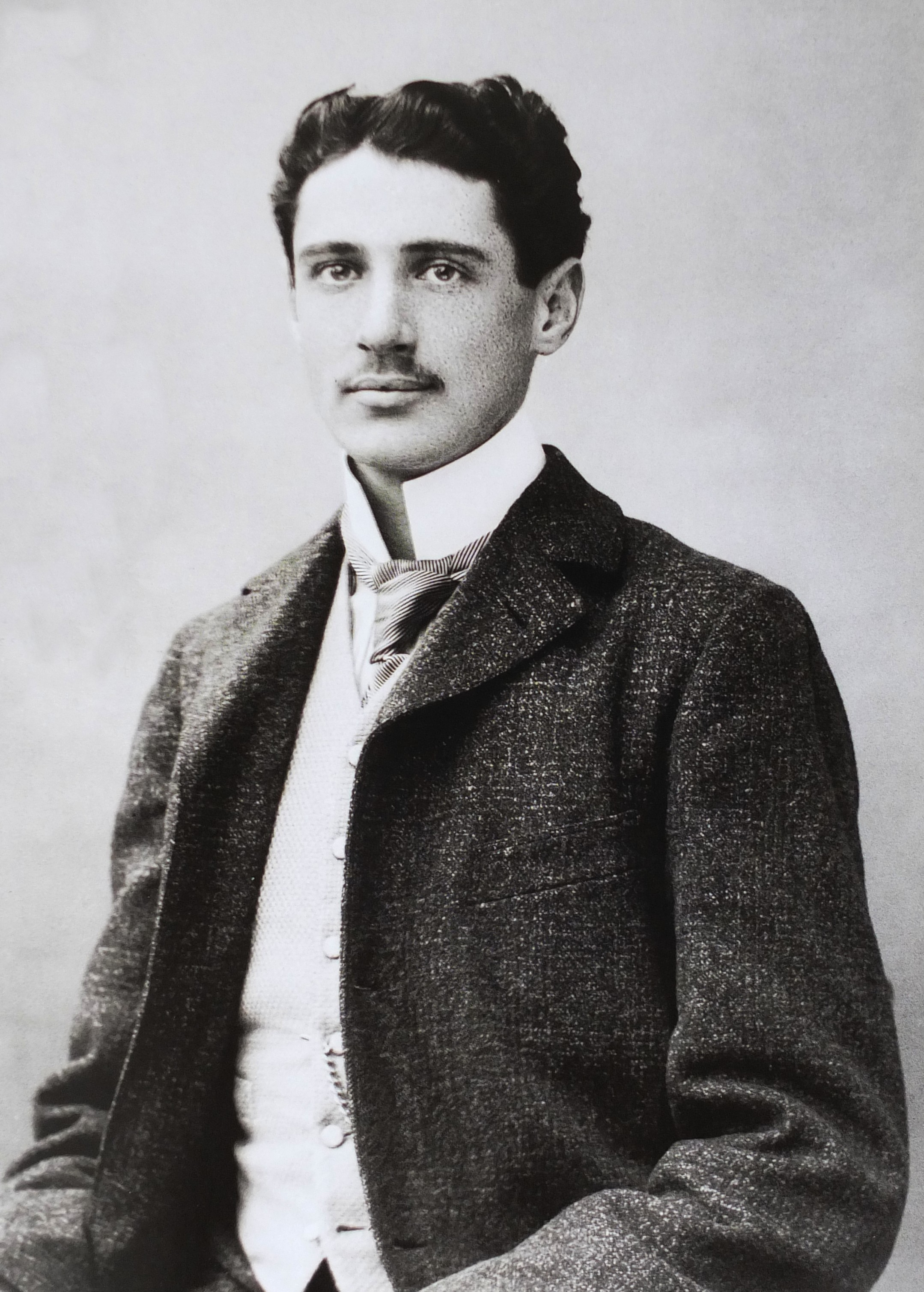 Armand de Gramont, duc de Guiche, photographié le 16 novembre 1900 par Paul Nadar.